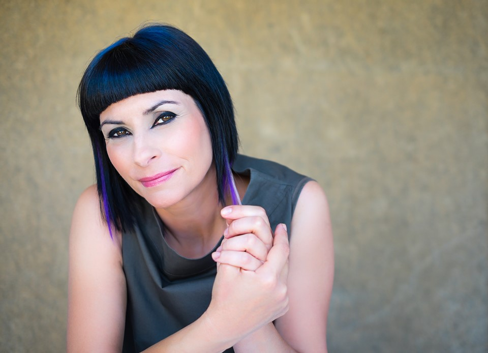 Co-fundadora da banda Entre Aspas e do projecto Camaleão Azul